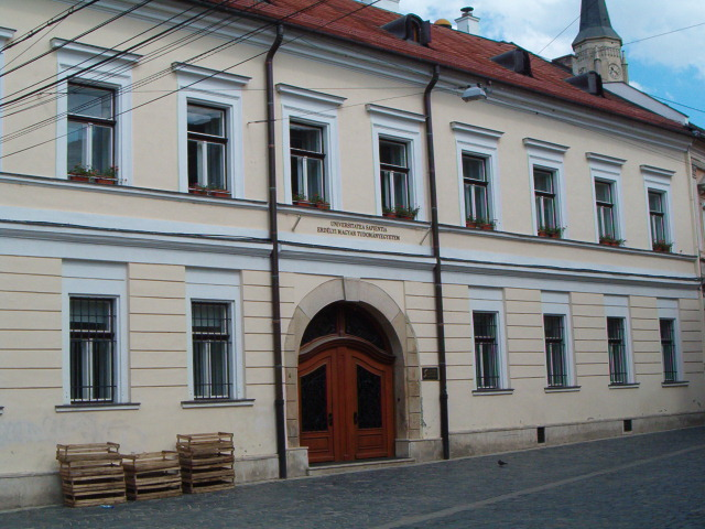 Universitatea Sapientia Cluj-Napoca